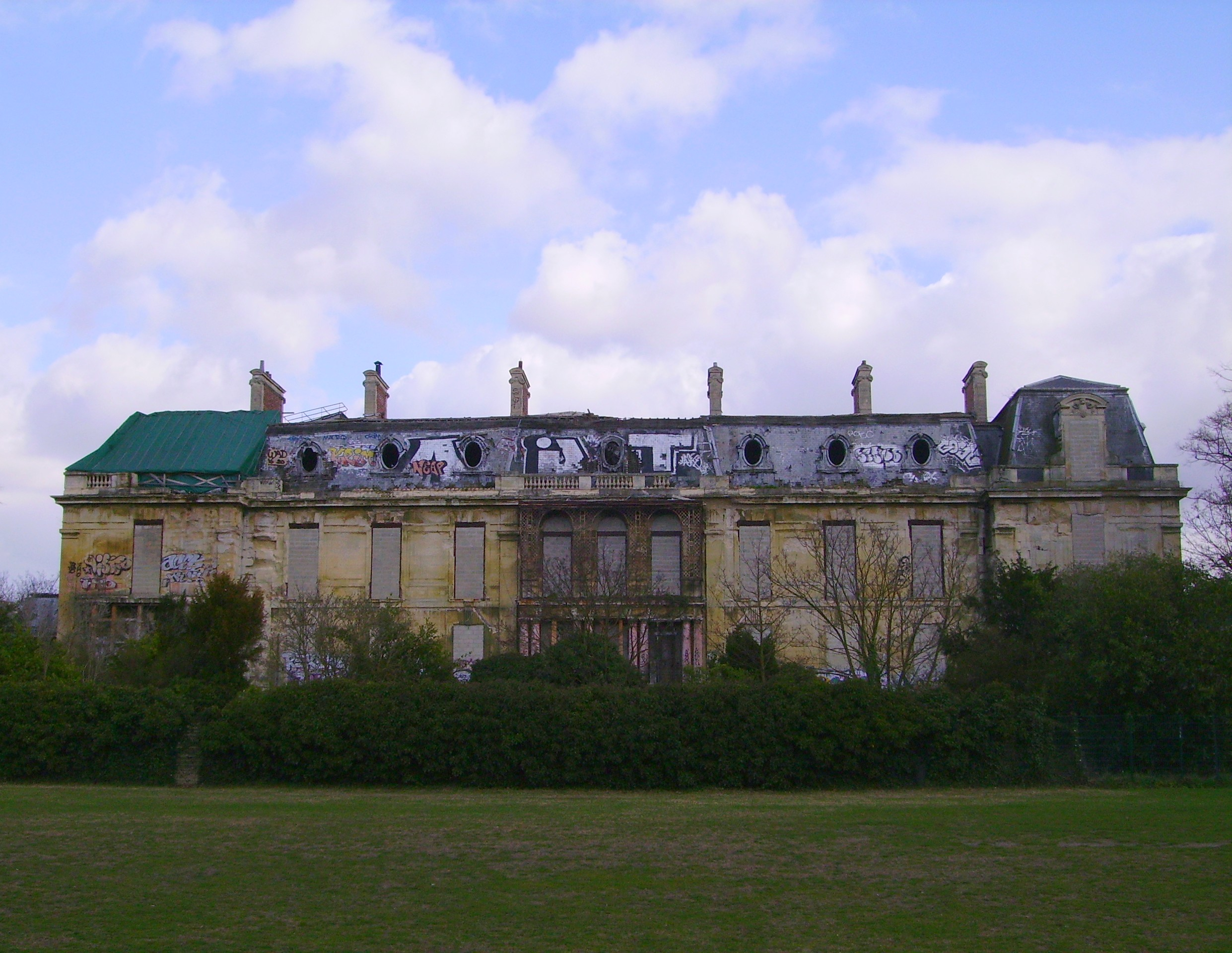 Le château du parc Rothschild à Boulogne-Billancourt dans son état actuel. Construit de 1855 à 1861 par Berthelin et Lami.